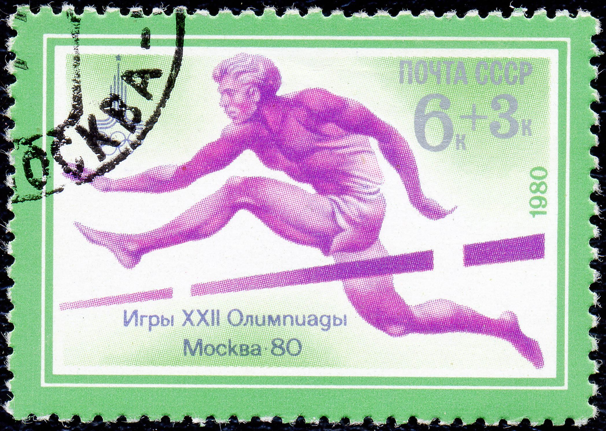 Почтовая марка СССР. 1980. XXII Летние Олимпийские игры. Бег с барьерами